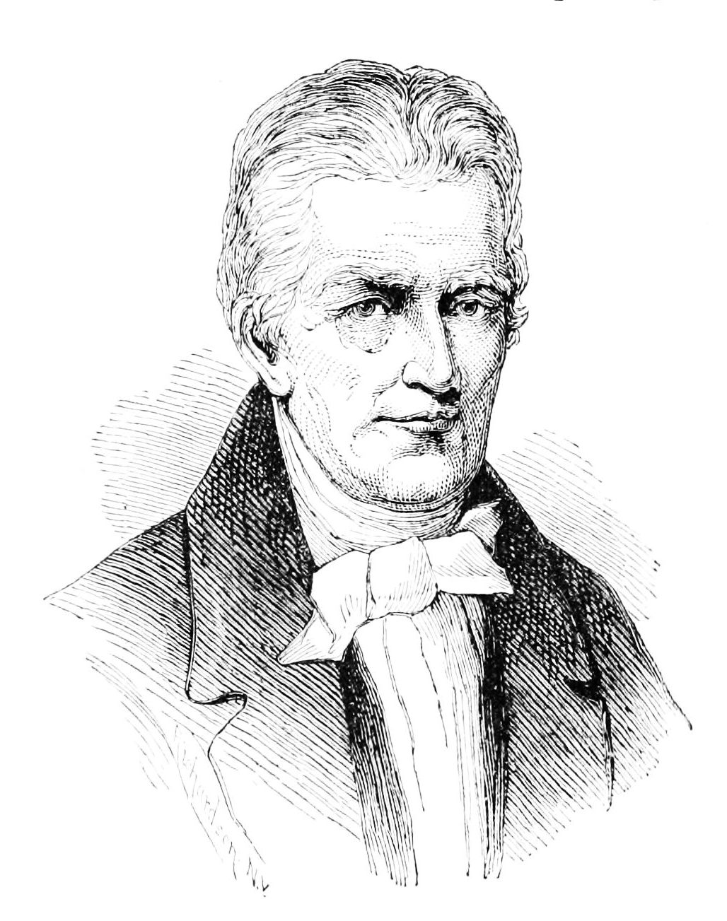 Oliver Evans